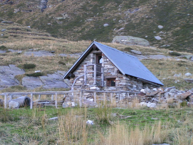 Capanna Borgna dormitorio Foto scattada da Elvezio